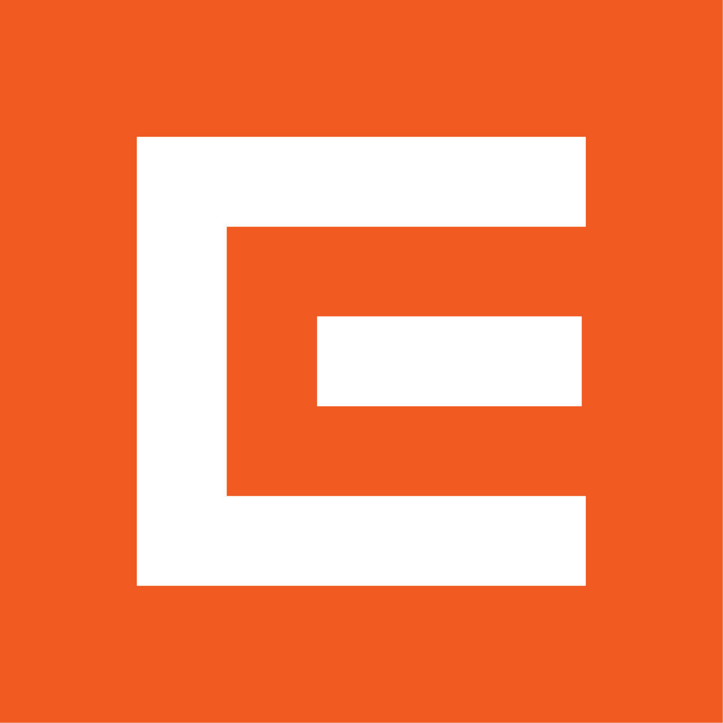 ČEZ logo